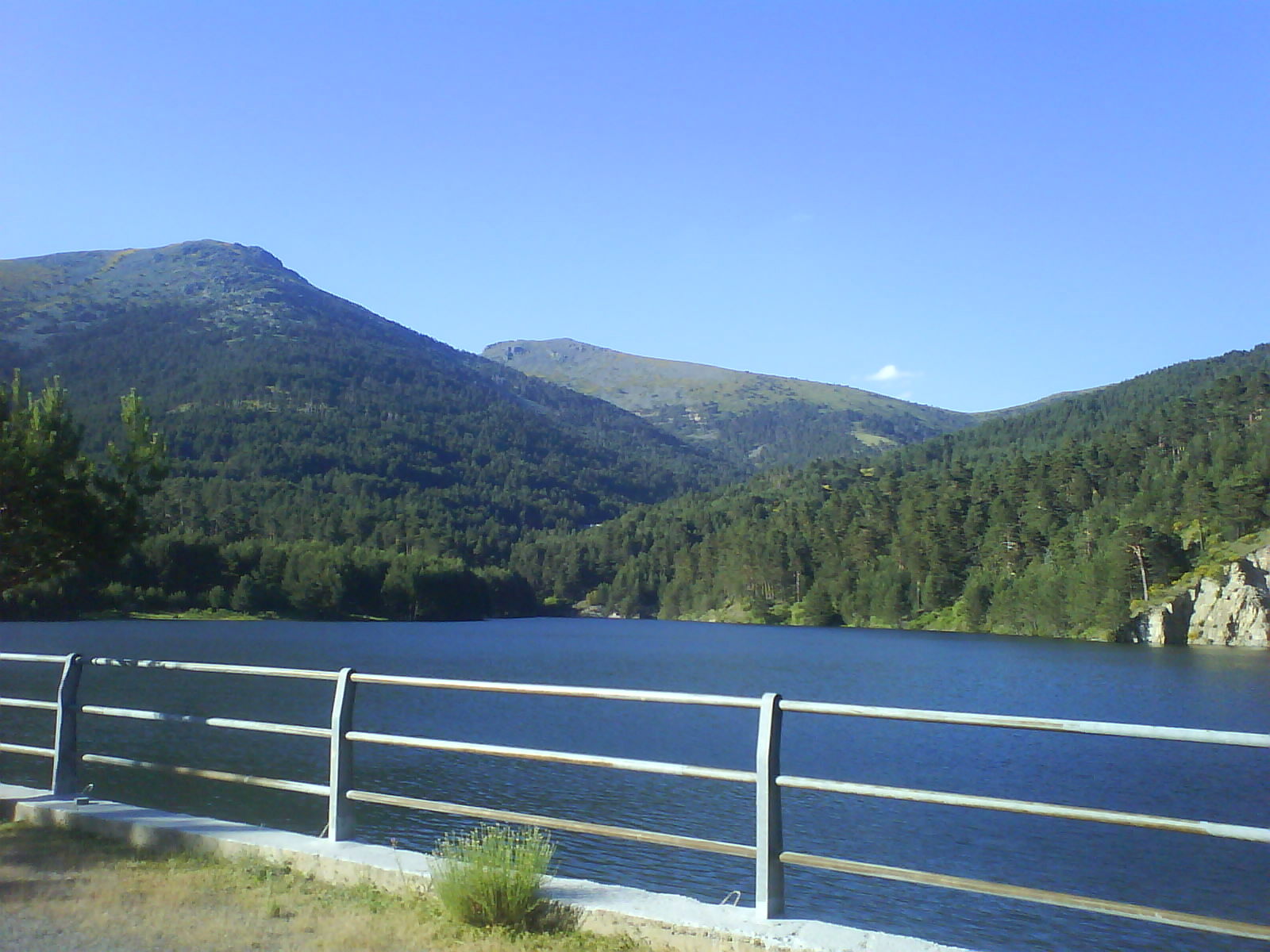 Valle del río Moros, vita del Pico del Oso desde la presa del embalse de LA Tabladilla. El Espinar, Segovia, España.